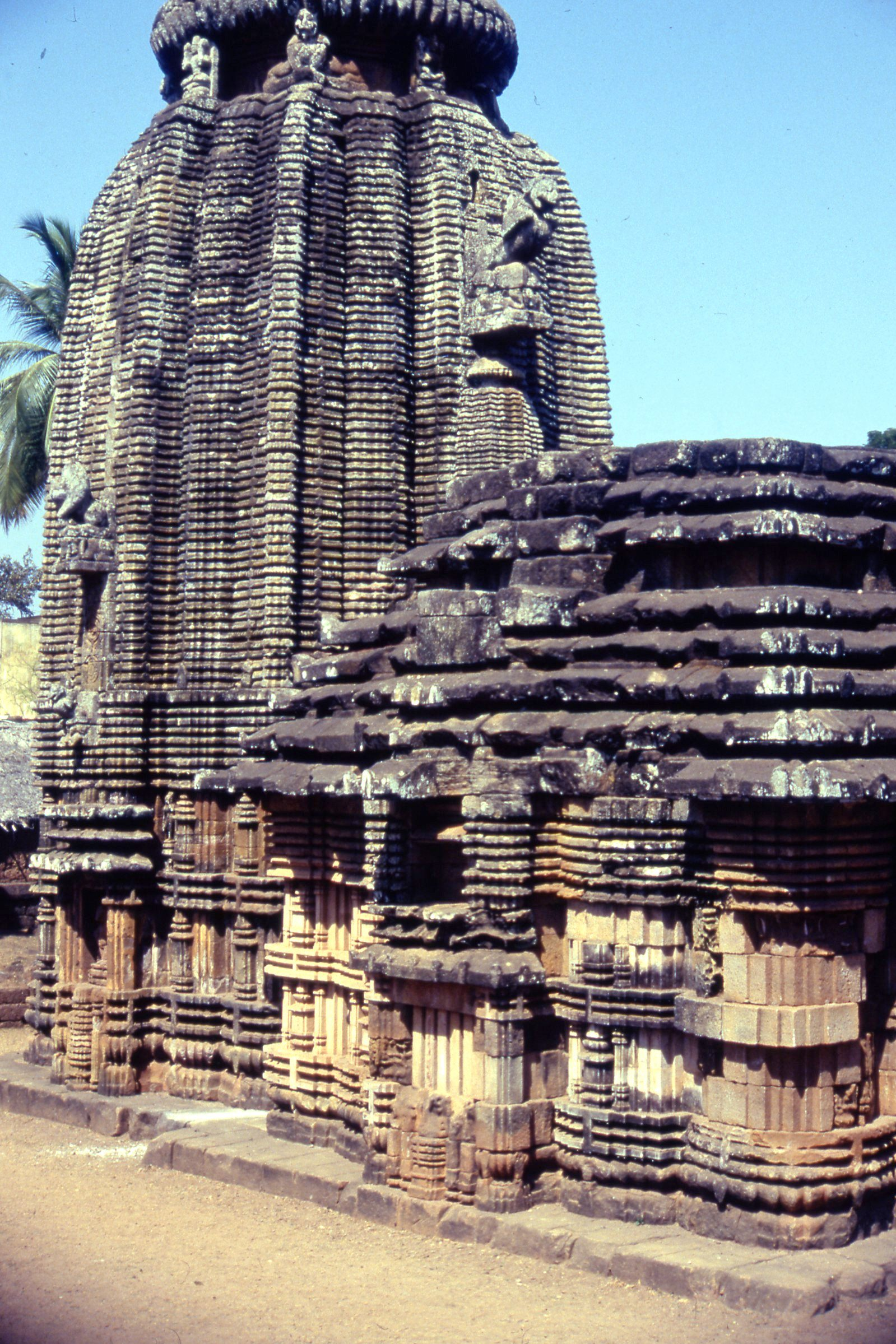 Vista de un Sikhara , y de un Mandapa al que se le cayó el Ghanta en la parte superior, Bhuvanesvar, Orissa, India.